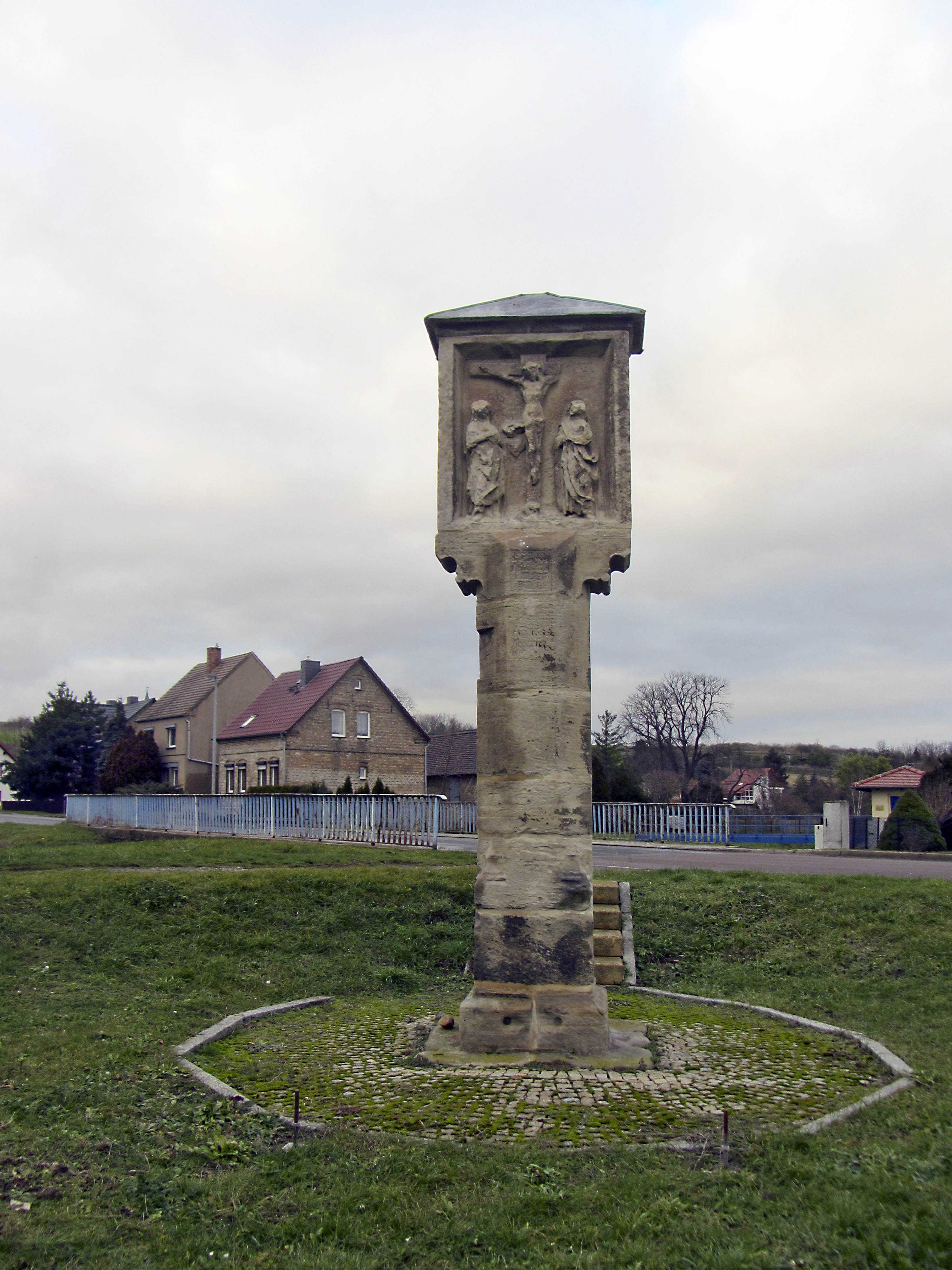 Betsäule Zappendorf